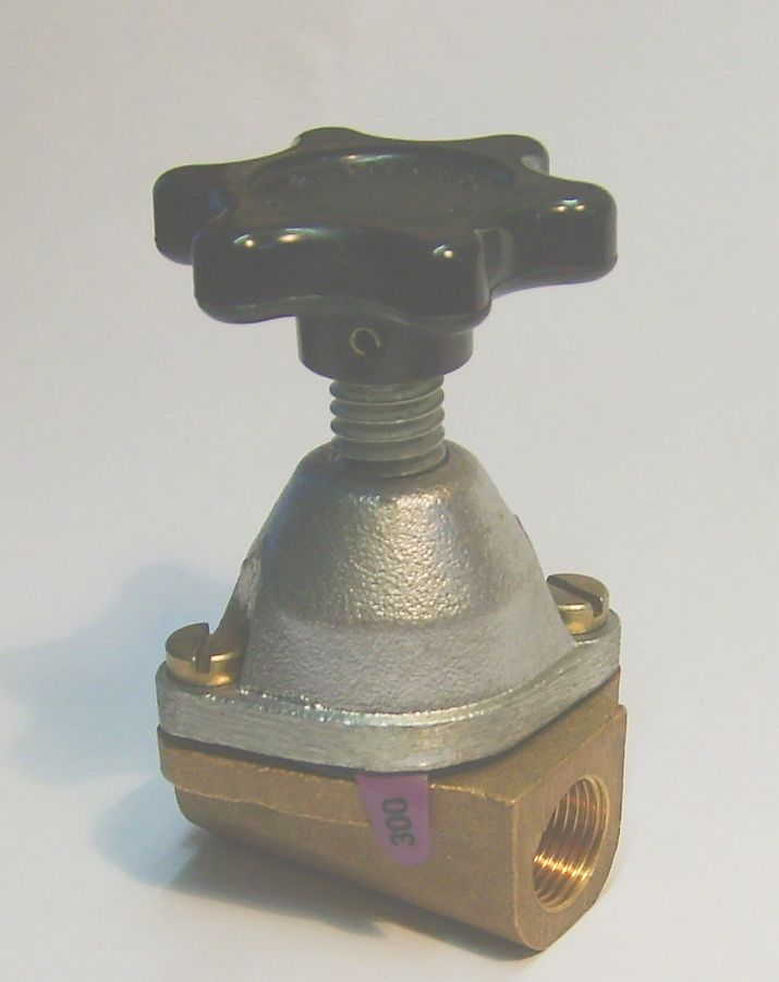 picture of small membrane valve